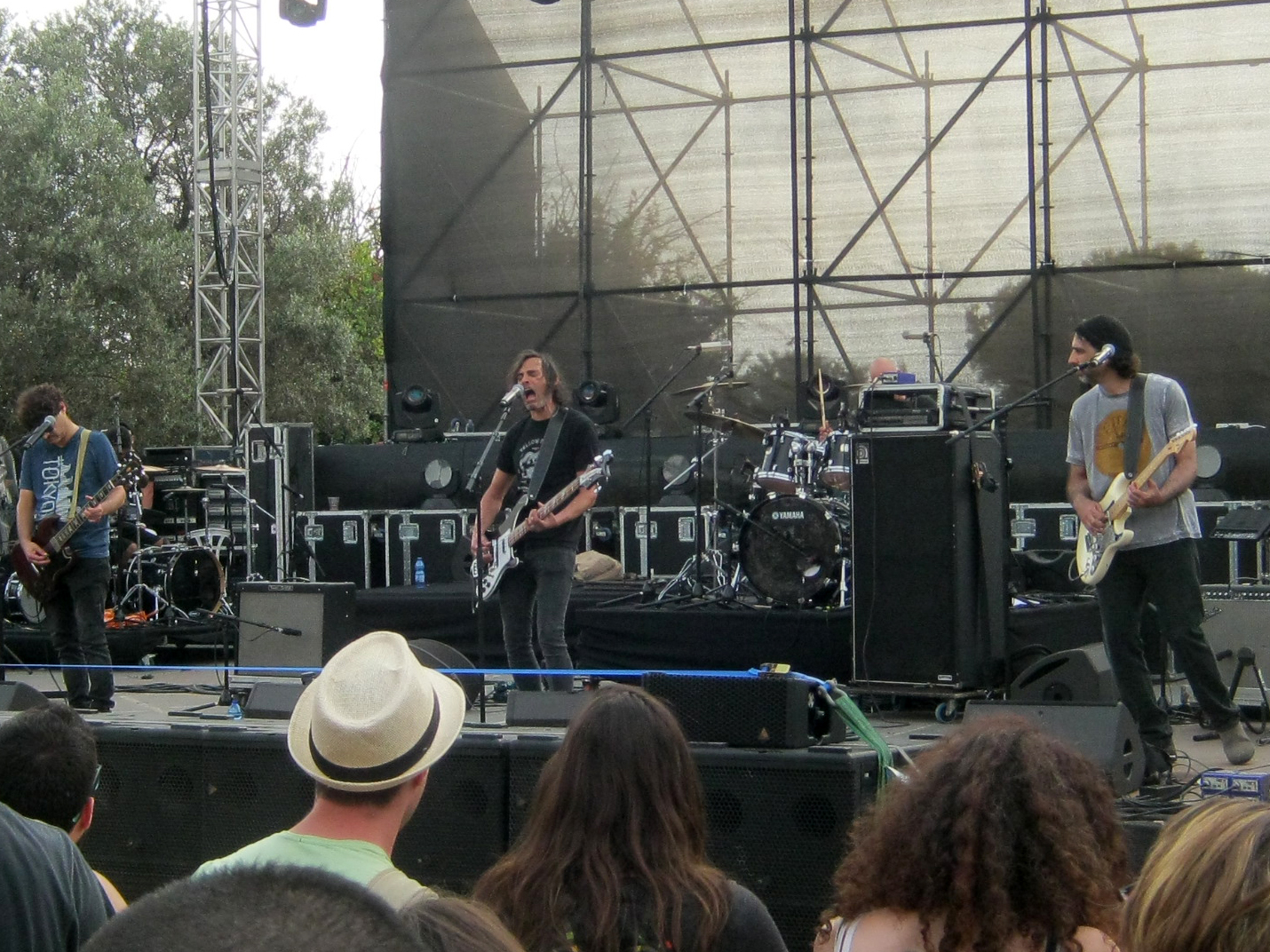 Israeli rock band, Eifo HaYeled? Stutent's festival. Tel Aviv University, 2016